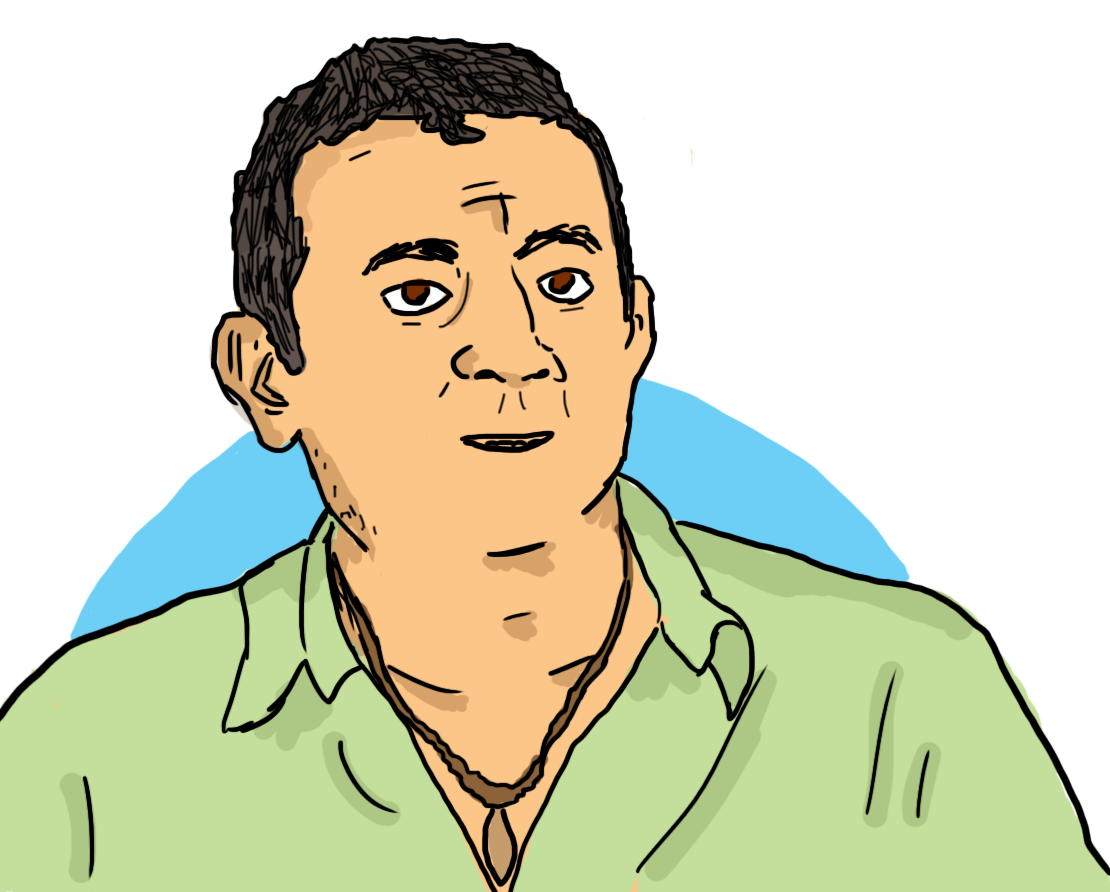 דיוקן מצויר בעזרת תוכנת "פוטושופ" של אמן הקומיקס המצרי מגדי א-שאפעי, מאויר בסגנון 'קרטוני'. הדיוקן מבוסס על תמונה של א-שאפעי.